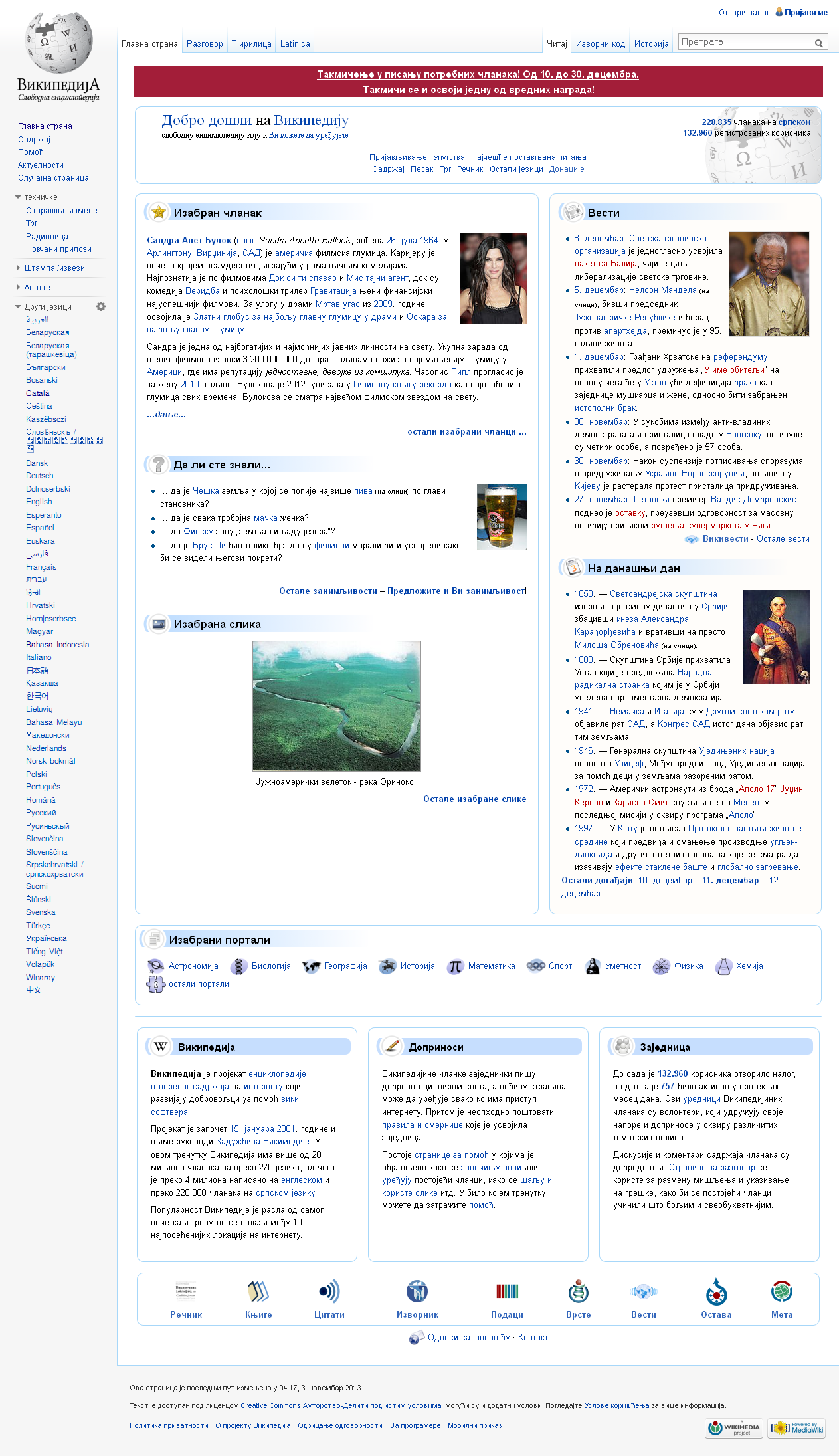 Screenshot - Hlavní strana srbské Wikipedie ze dne 11. prosince 2013